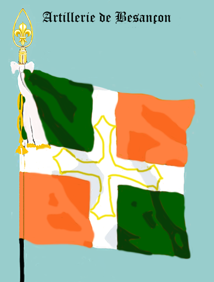 Ordonnanzfahne des königlich französischen „Régiment d'Artillerie de Besançon“. - Entnommen und überarbeitet aus: „LES UNIFORMES ET LES DRAPEAUX DE L'ARMÉE DU ROI“ Marseille 1899. (Drapeau d'Ordonnance du régiment française royale „Régiment d'Artillerie de Besançon“.)